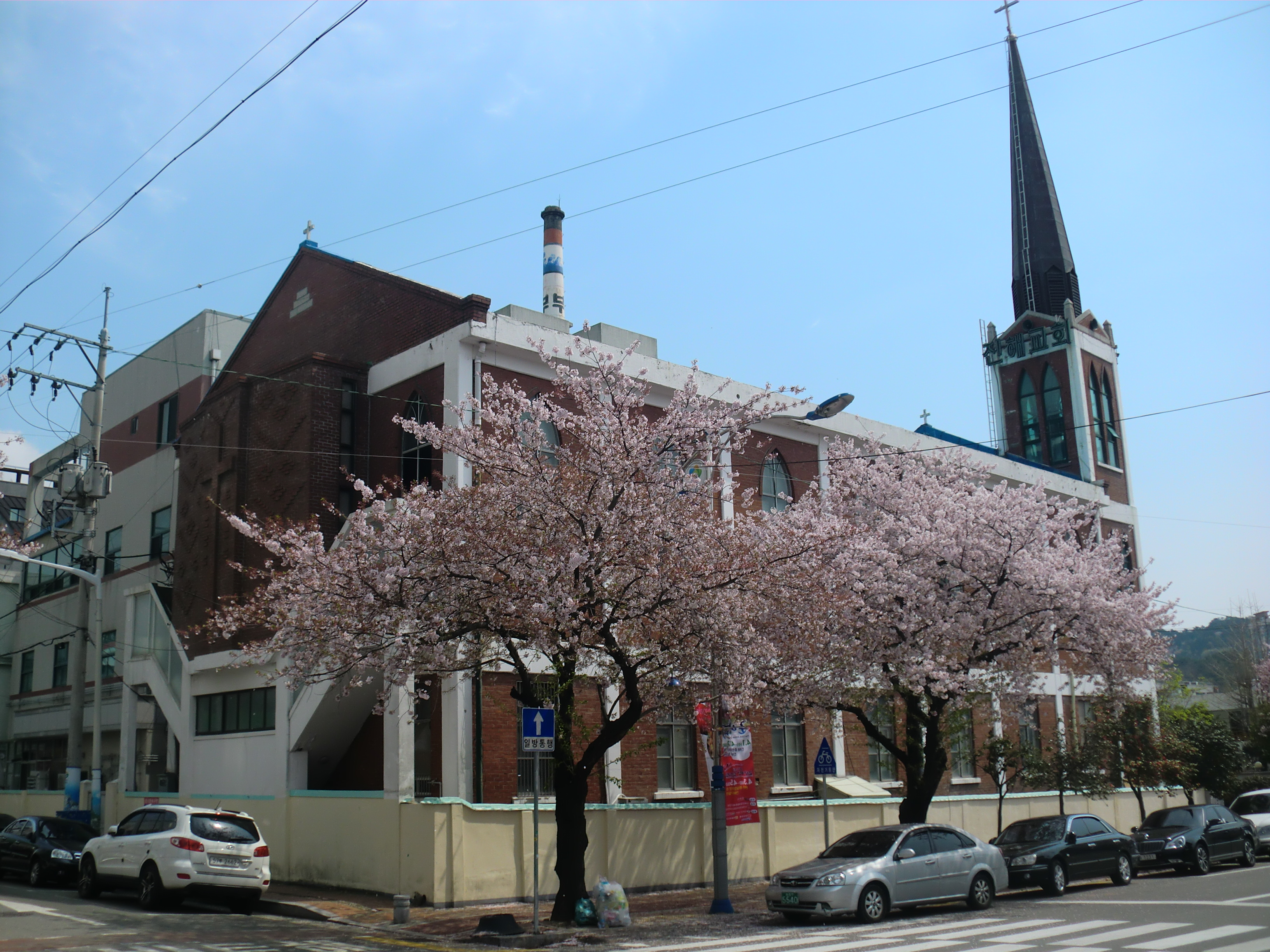 창원시에 있는 진해장로교회